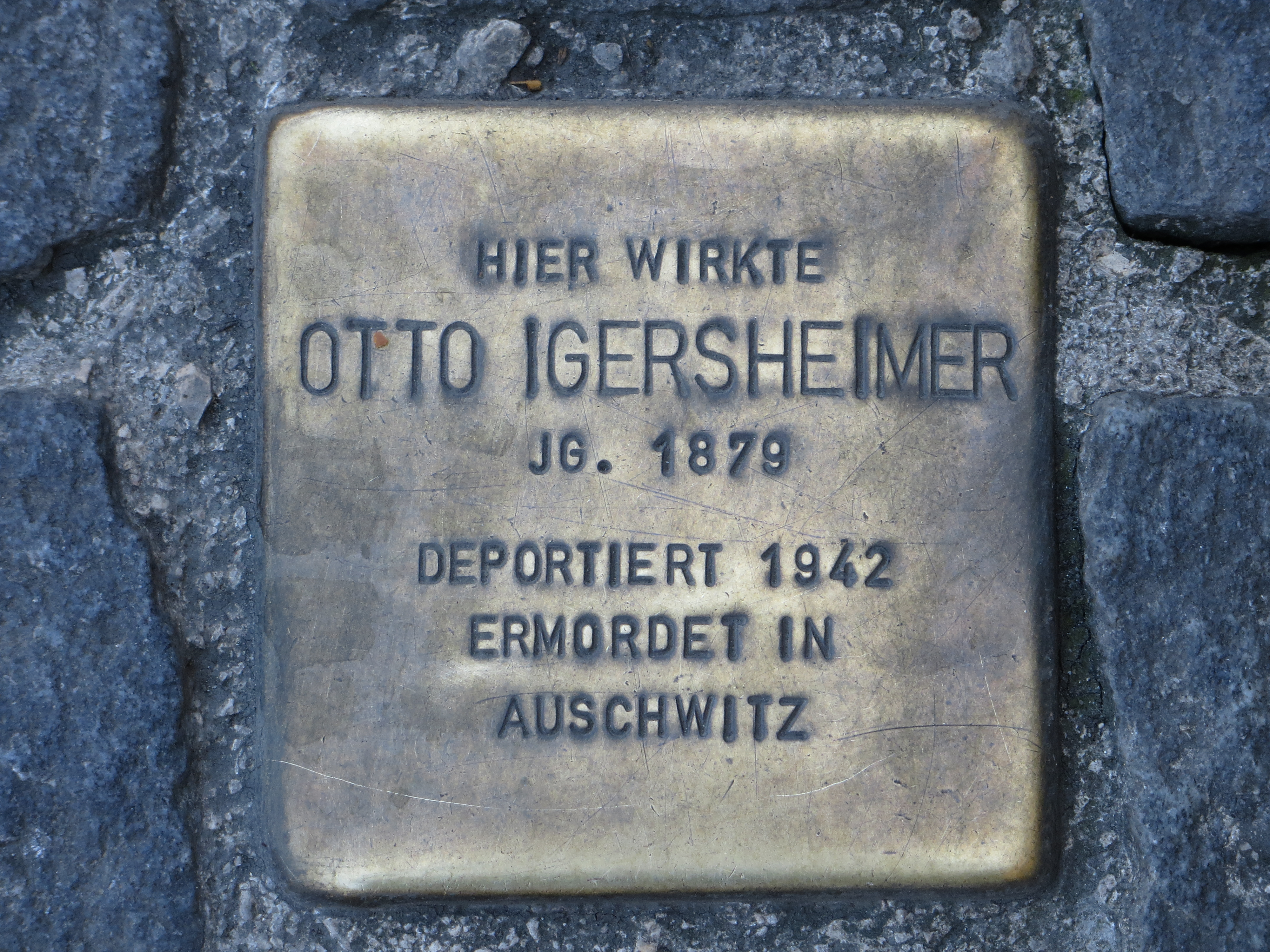 Stolperstein für den jüdischen Bankier Otto Igersheimer vor dem Gebäude Kaiserstraße 34 in Heilbronn